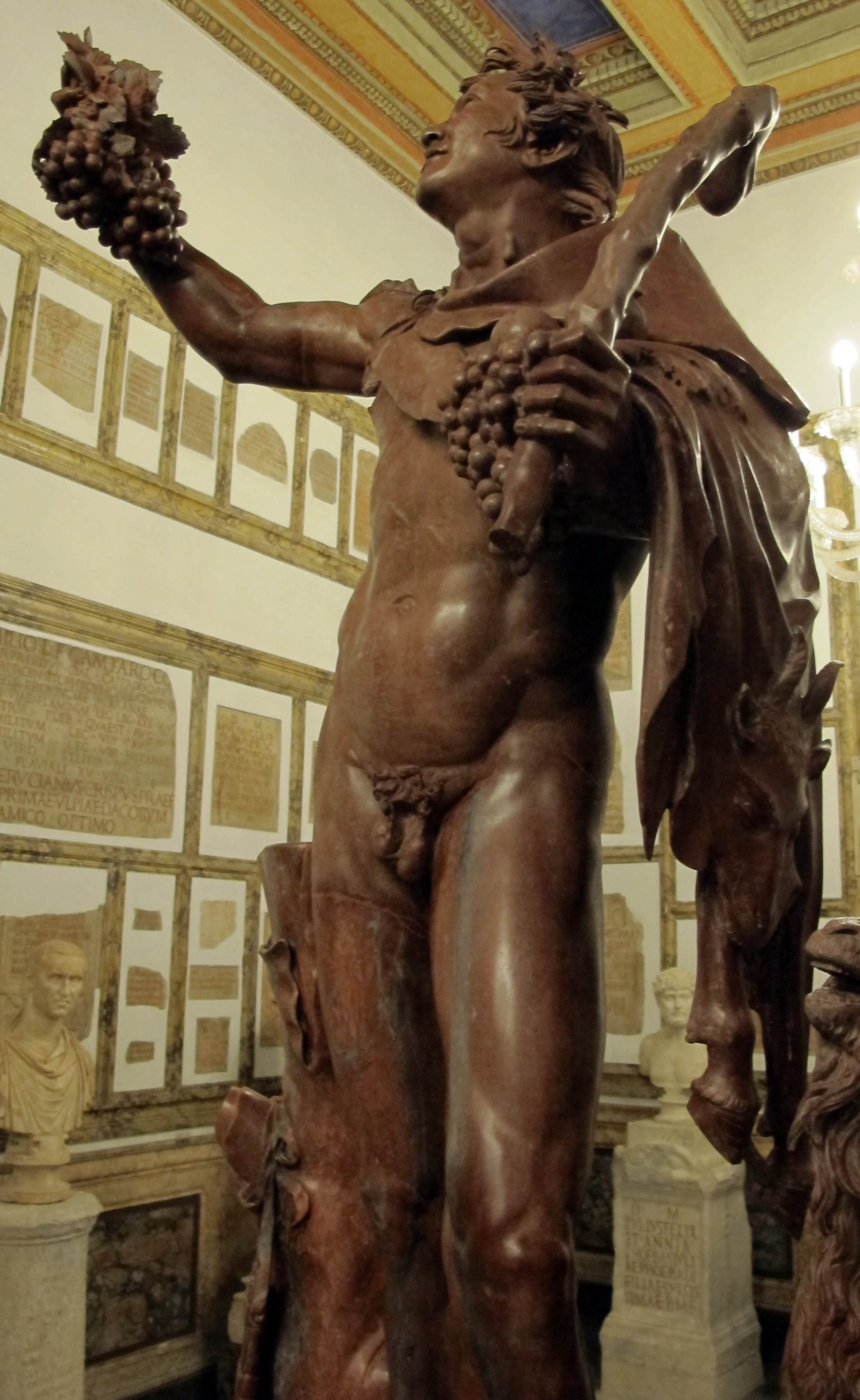 Musei Capitolini